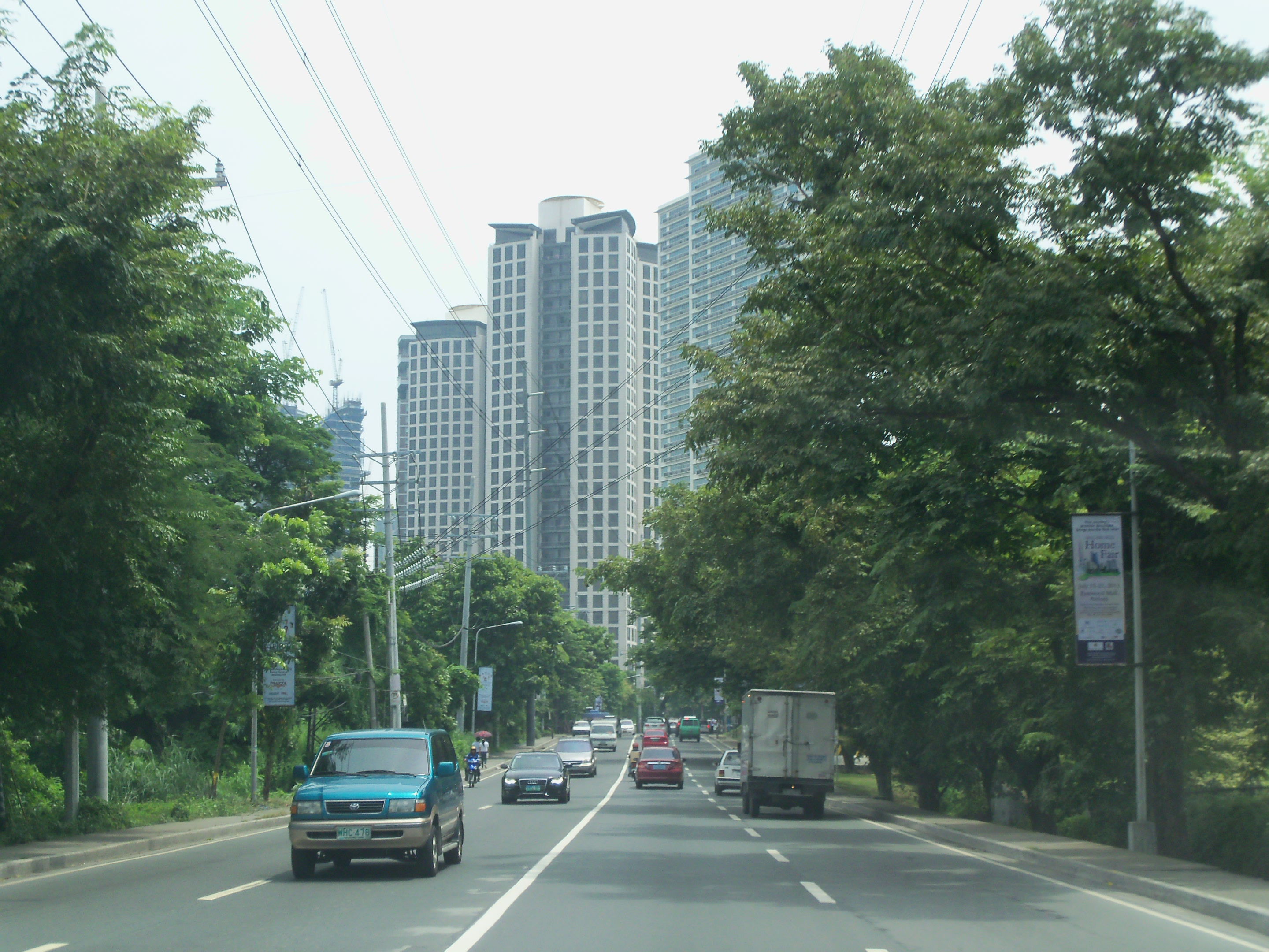 Manila, Philippines